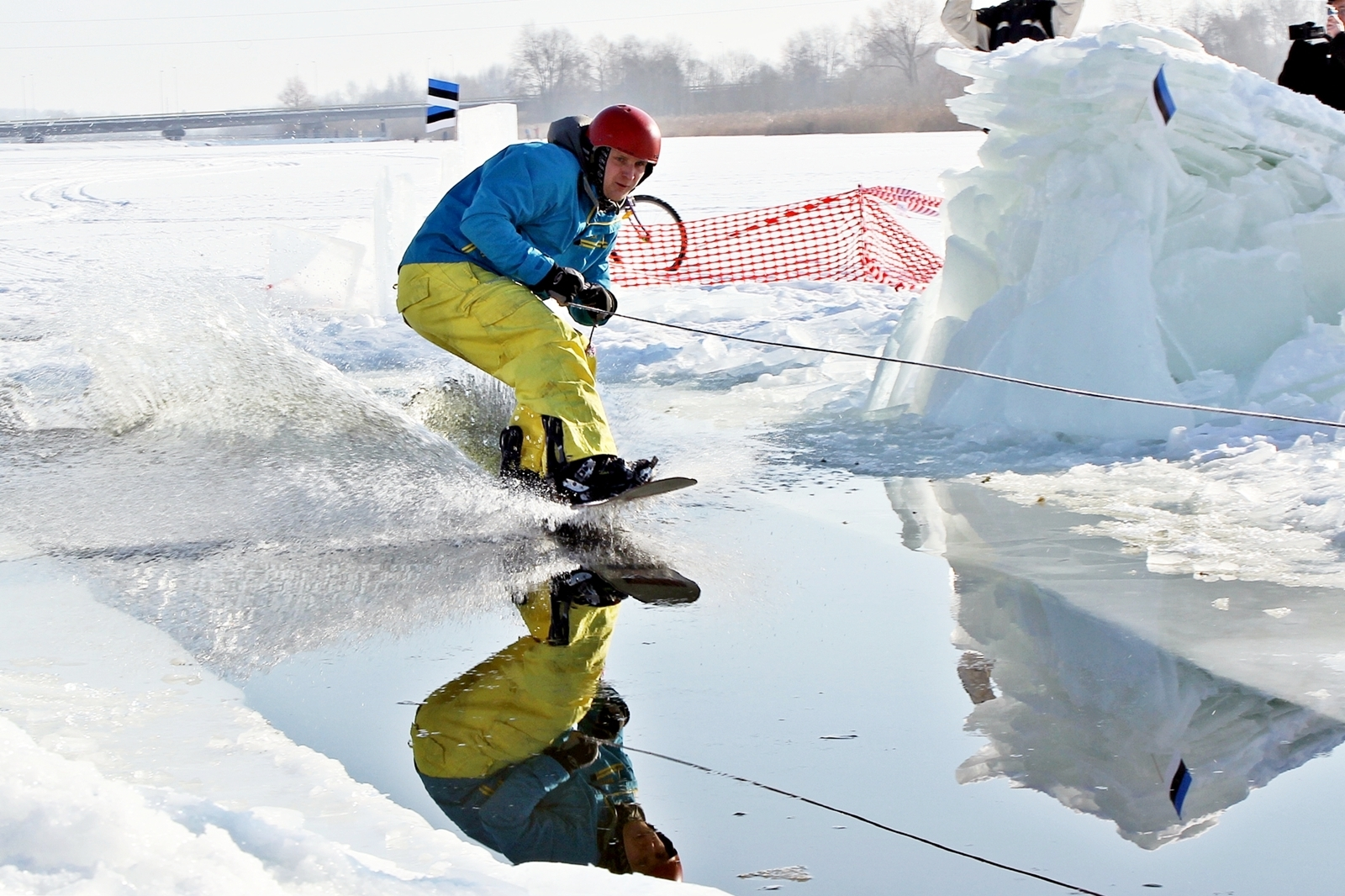 Oliver Karindi käib lumelauaga vee peale. Korraldaja - triatloni klub Trismile.